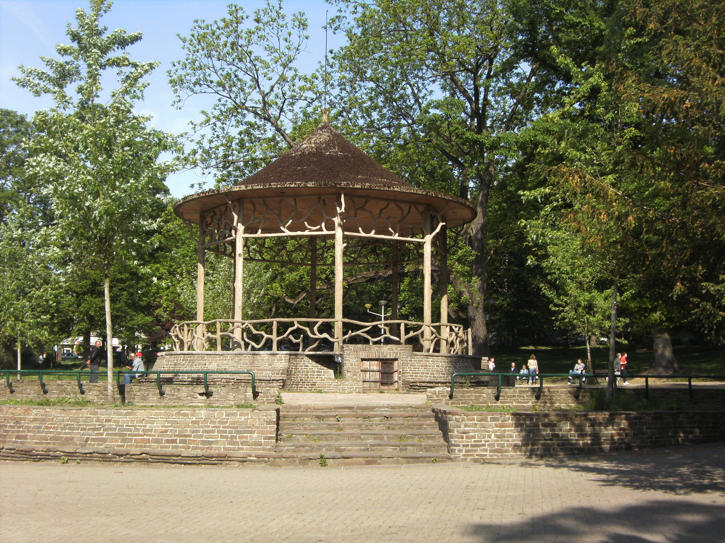 Charleroi (Belgique) - Parc Astrid : le kiosque